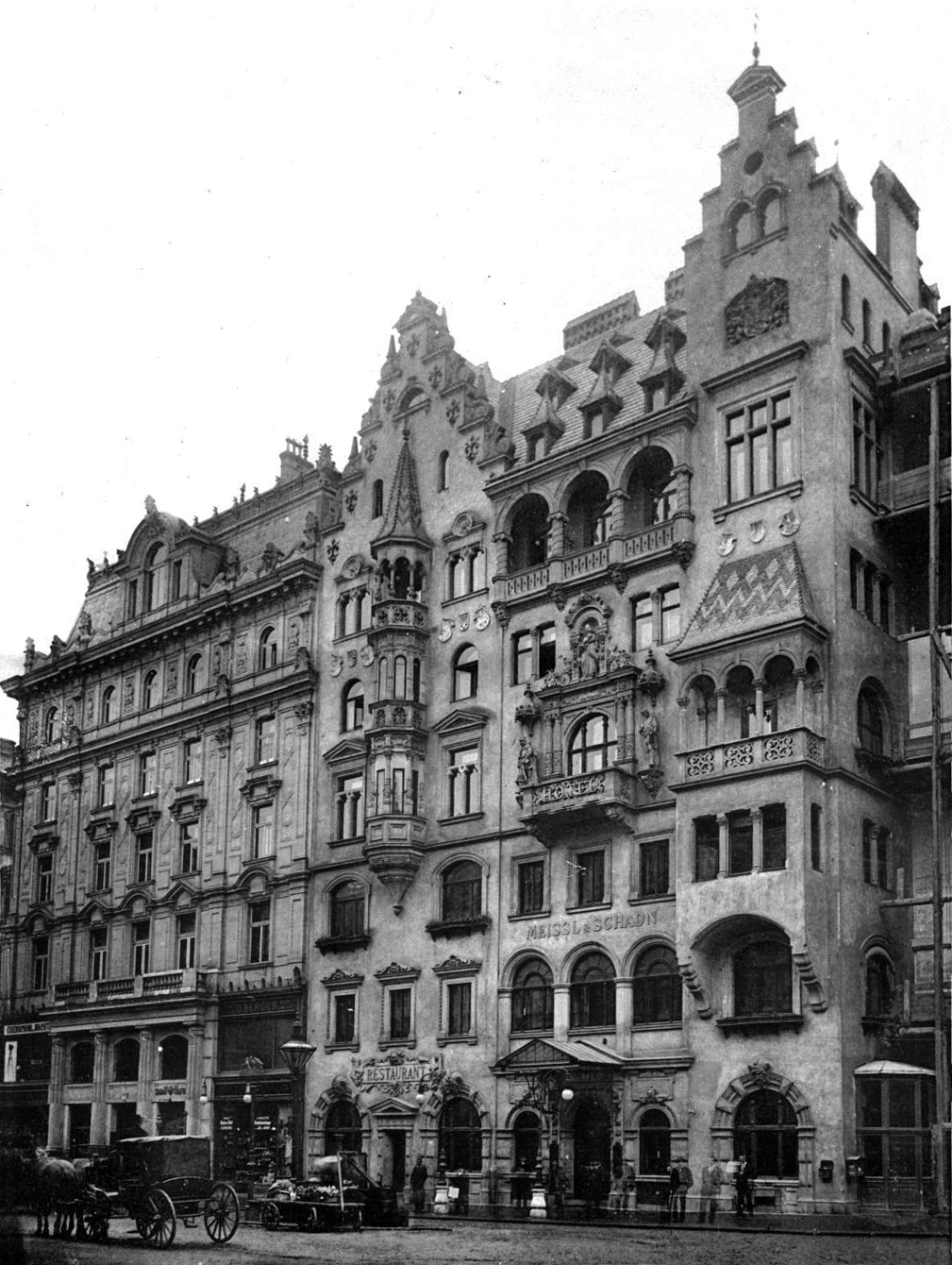 Hotel Meissl & Schadn, Wien, Neuer Markt 2